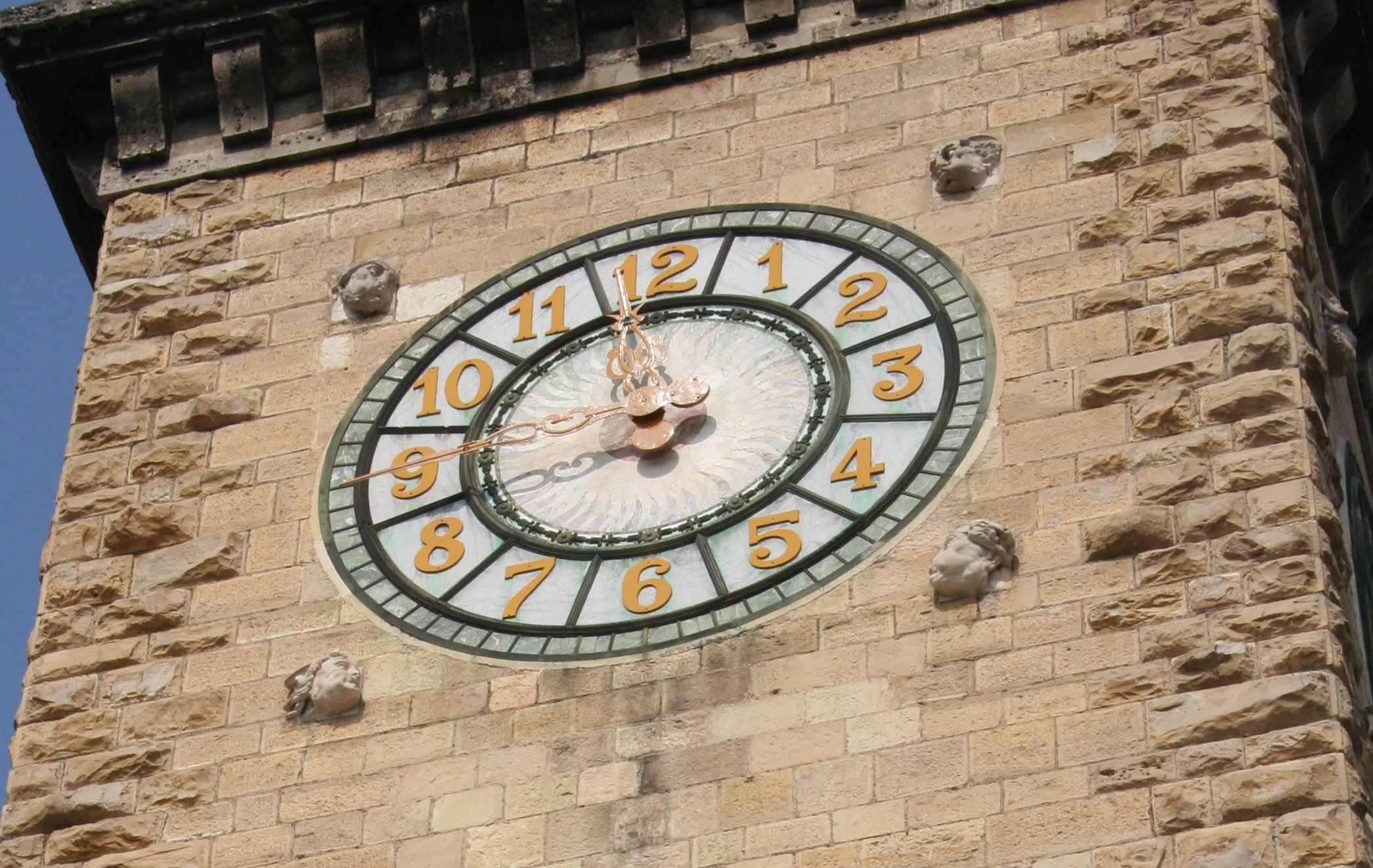 La Torre dei Caduti a Bergamo. Particolare.